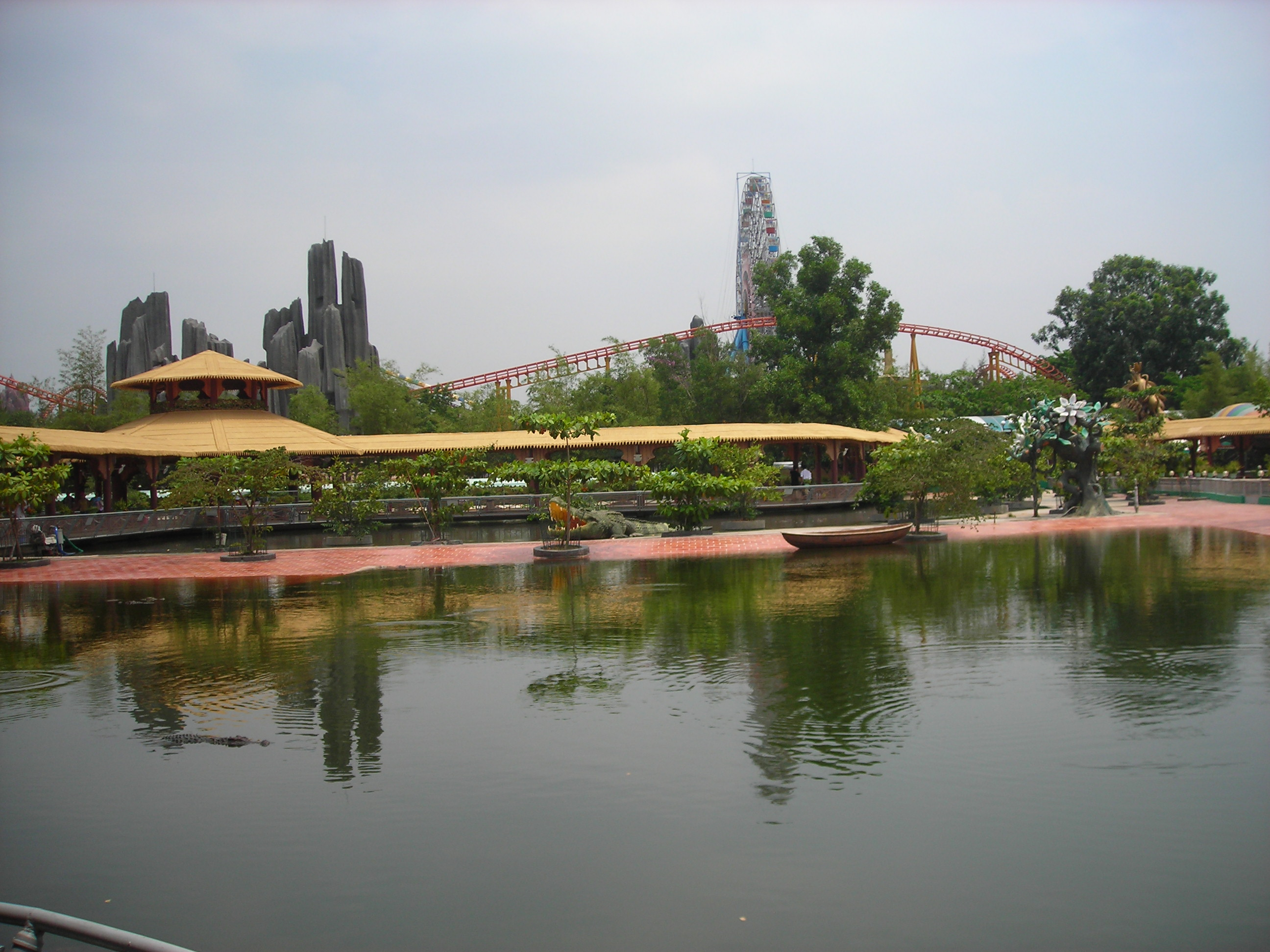 Suoi Tien Park in Saigon